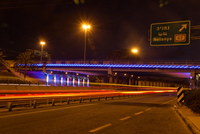 תאורת לילה במחלף נתניה , יוני 2009